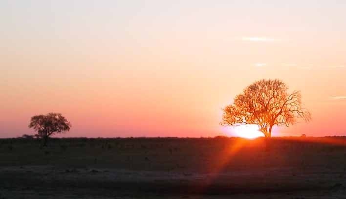 Излазак сунца, Хванге, Зимбабве, Децембар 2001, Аутор Радован Корда